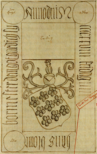 Von dem hannoverschen Amts- und Kammerschreiber sowie Chronisten Johann Heinrich Redecker im ersten Drittel des 18. Jahrhunderts gemalte Grabplatte des Bürgermeisters „Hans Blome der Jüngere“ die mutmaßlich am Boden der an die Marktkirche angebauten St. Annen-Kapelle ausgelegt war. Die untere rechte Ecke der Grabplatte war von einer Treppenstufe überdeckt.